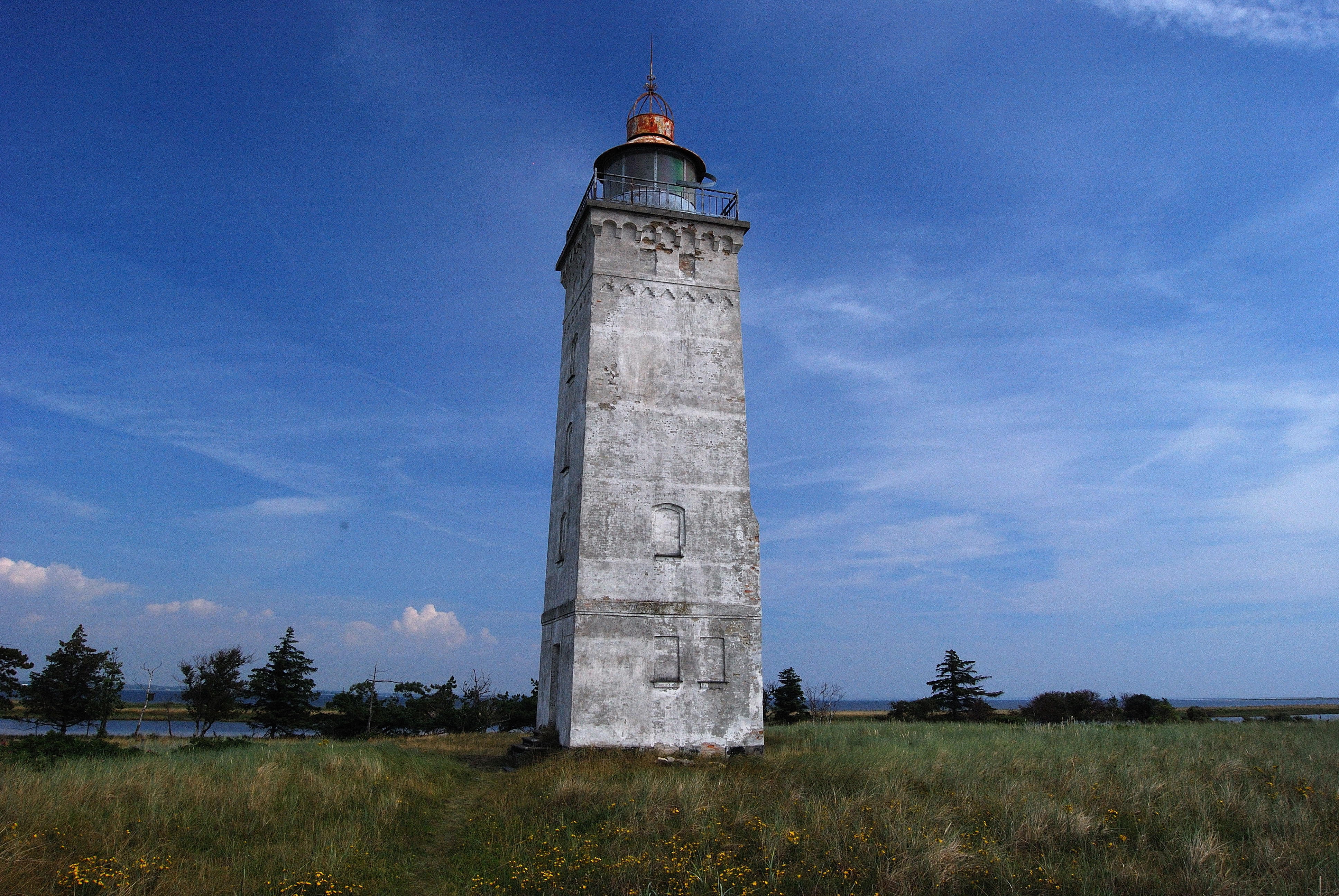 Hyllekrog Fyr